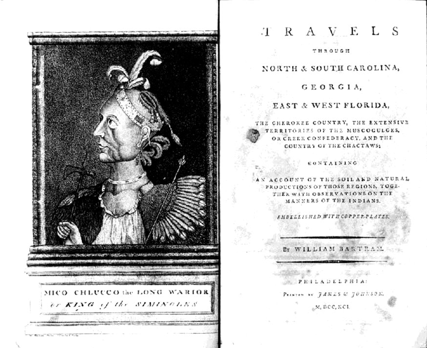 Sujet : Page de titre du livre de Bartram. Artiste : William Bartram Source : Wikipedia anglais, illustration du domaine publique. Licence